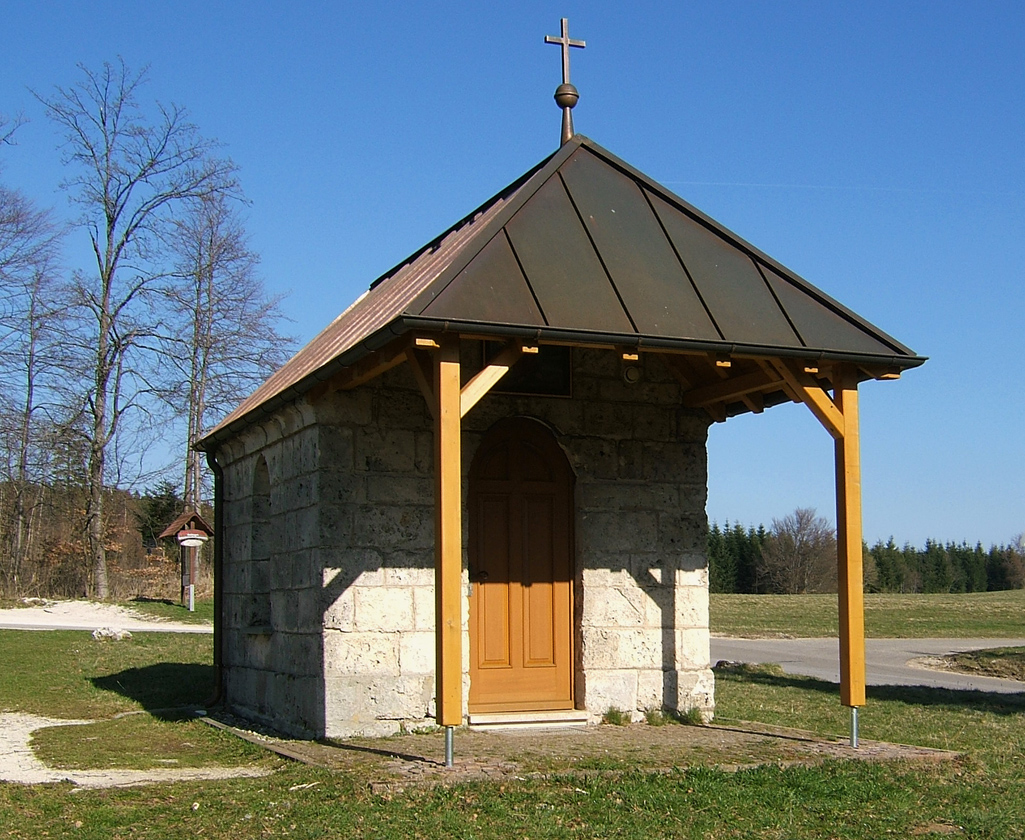 Kapelle oberhalb von Deilingen, von den Einheimischen "das Käppele" genannt